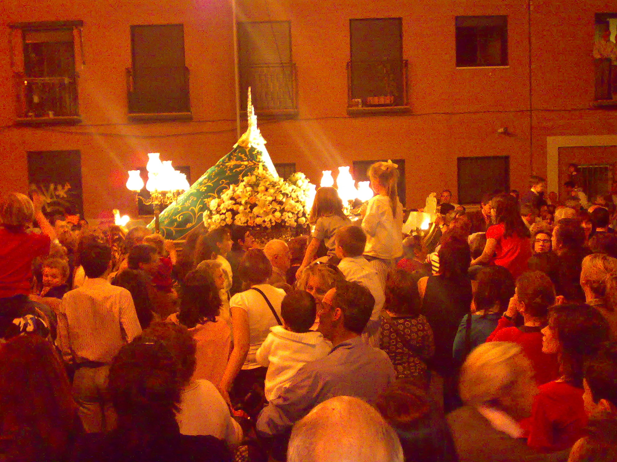 Recibimiento de la virgen de Valverde el 25 de abril, Fuencarral, Madrid